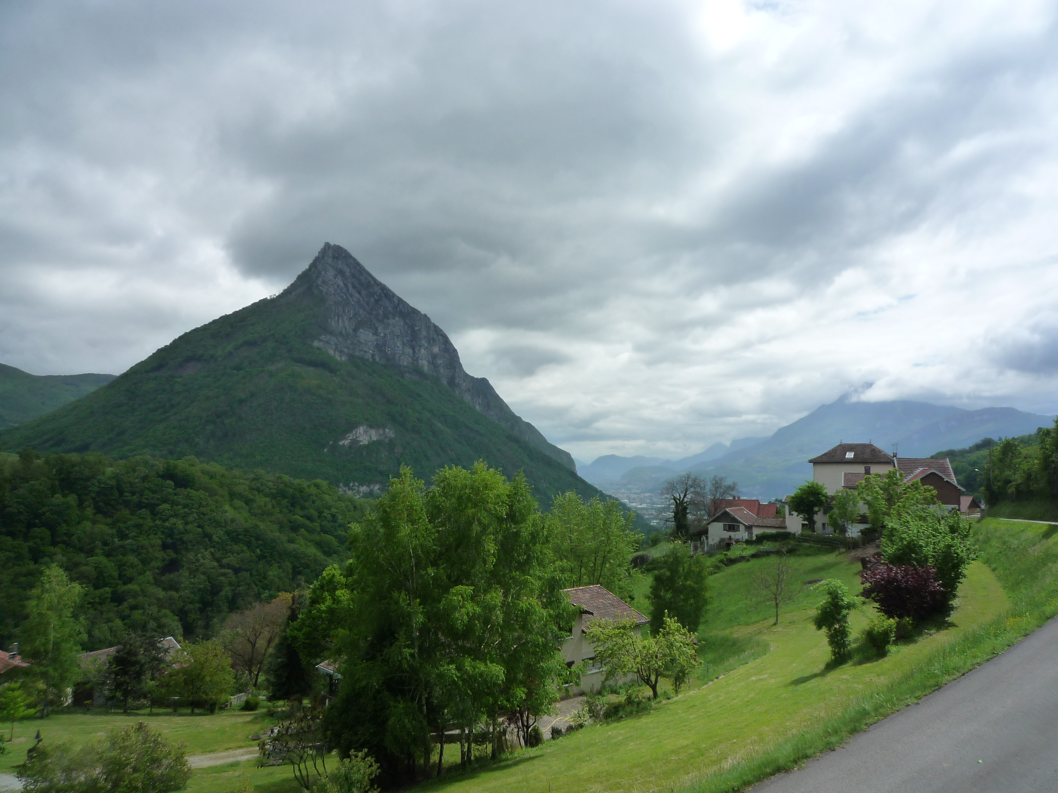 Vue sur St-Égrève depuis Proveysieux